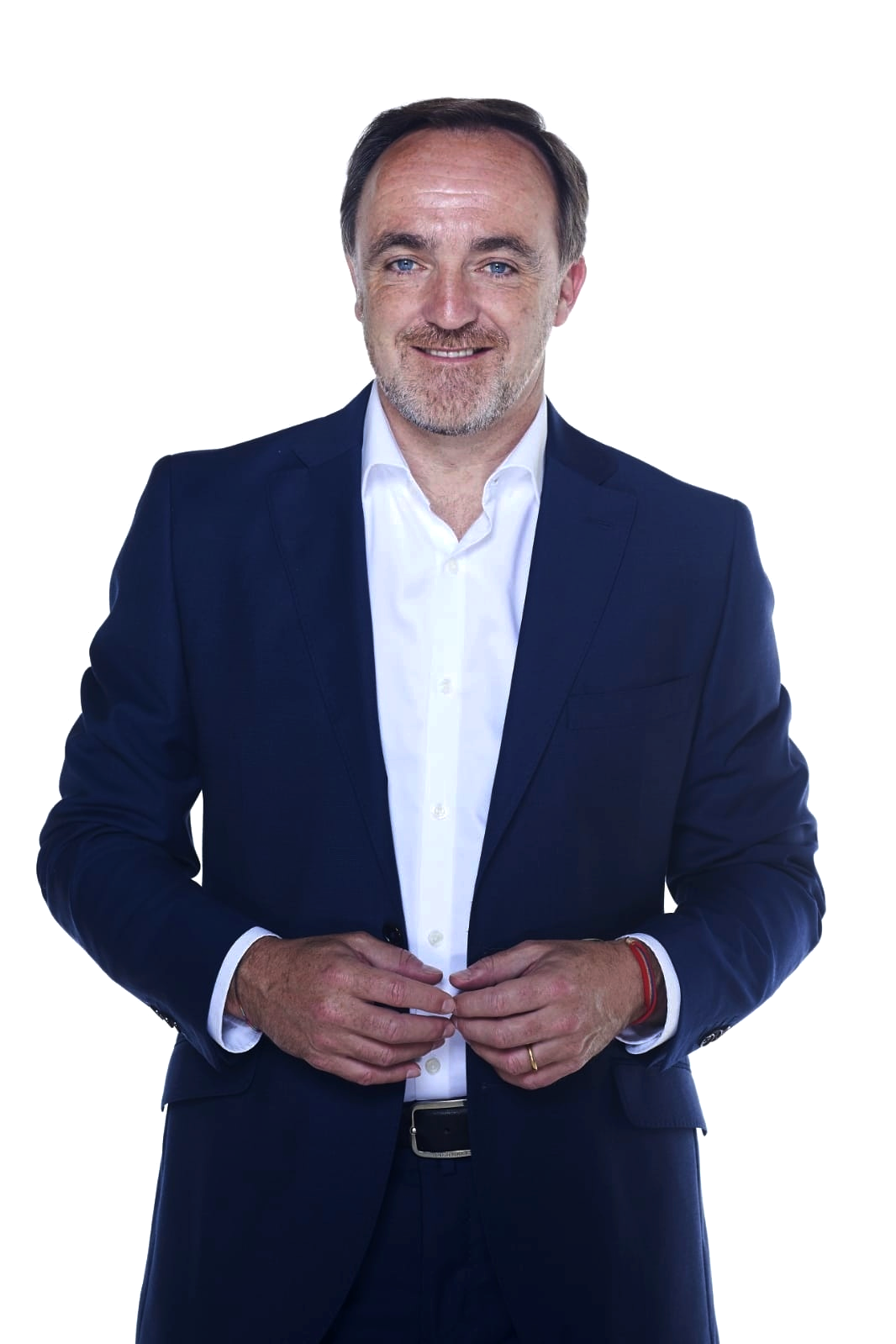 Javier Esparza Abaurrea